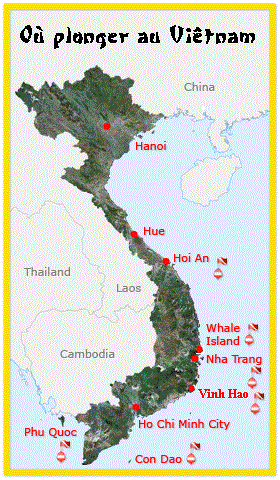 lieux de plongée sous-marine au Vietnam